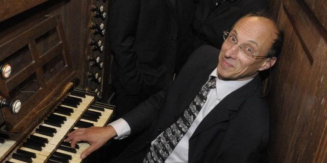 Jean-Luc Perrot, Souvigny's organ